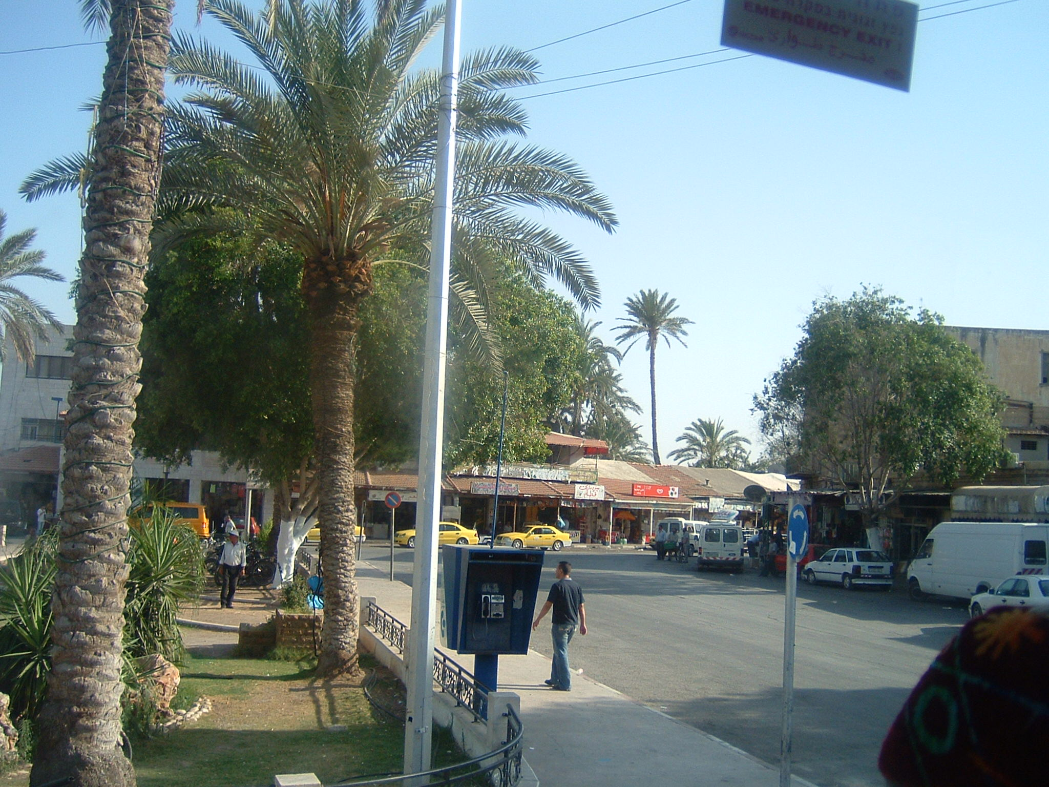 Scorcio della piazza centrale di Gerico moderna Foto scattata da me il 15 giugno 2008